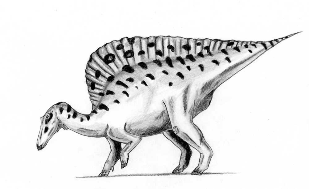 Ouranosaurus nigeriensis, pencil drawing